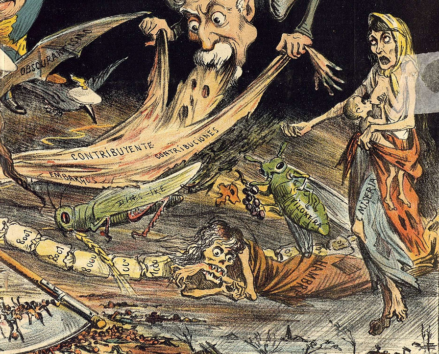 Plagas de que pronto, á España - quiere ver libre La ARAÑA, caricatura publicada en la revista satírica La Araña.